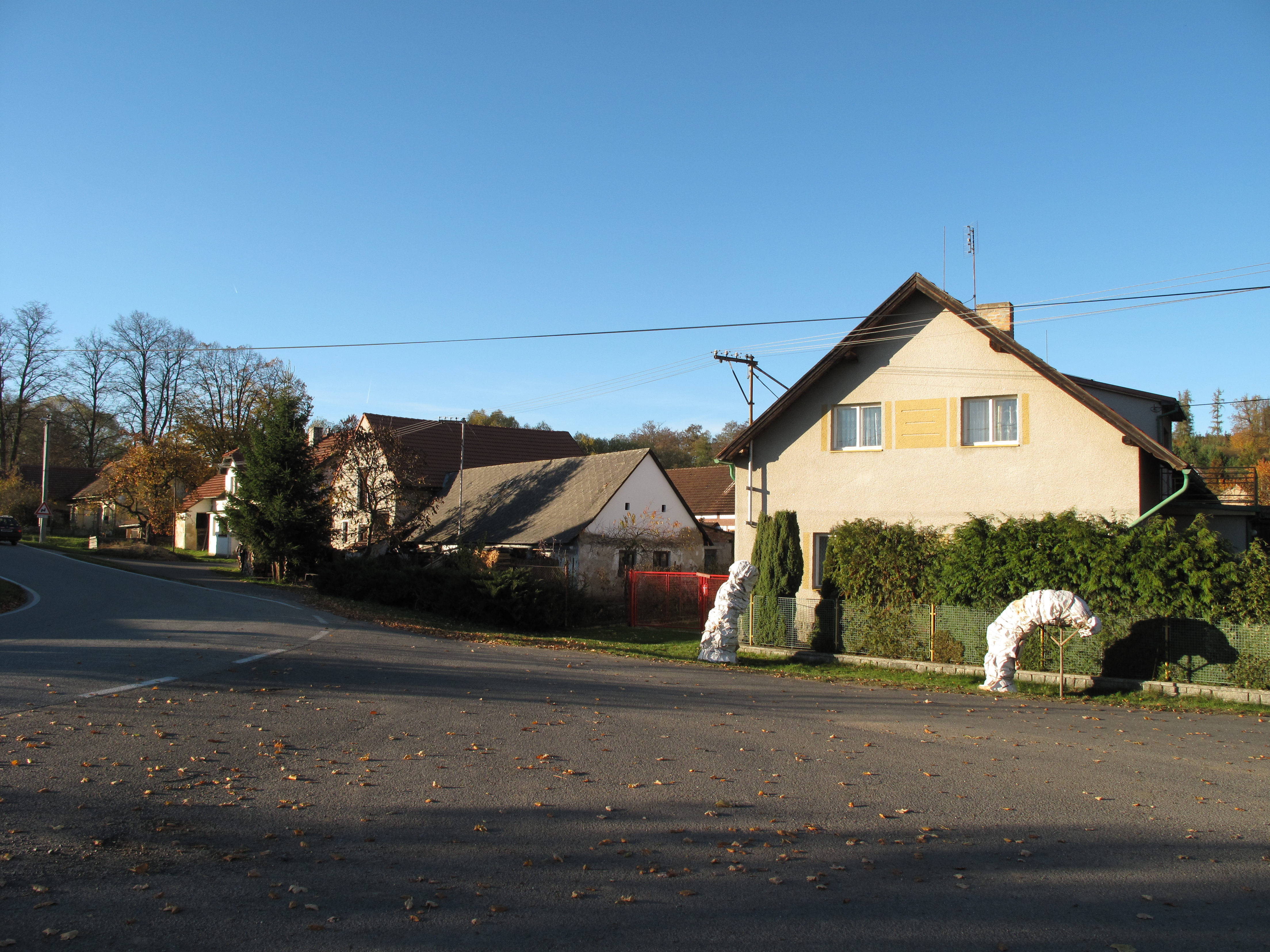 Náves v Tisově. Okres Strakonice, Česká republika.